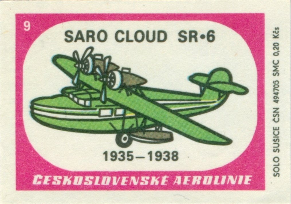 nálepky